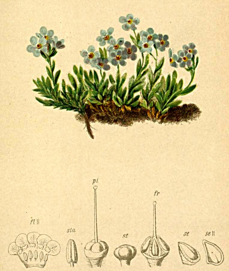 Eritrichium terglouense